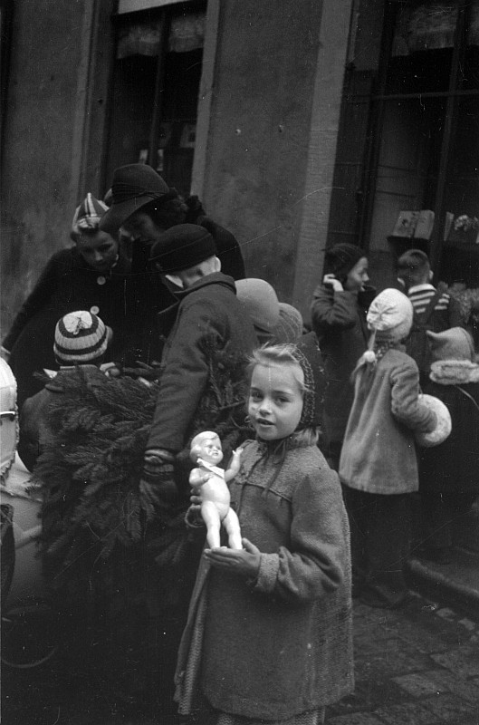 Original image description from the Deutsche Fotothek2. Reise